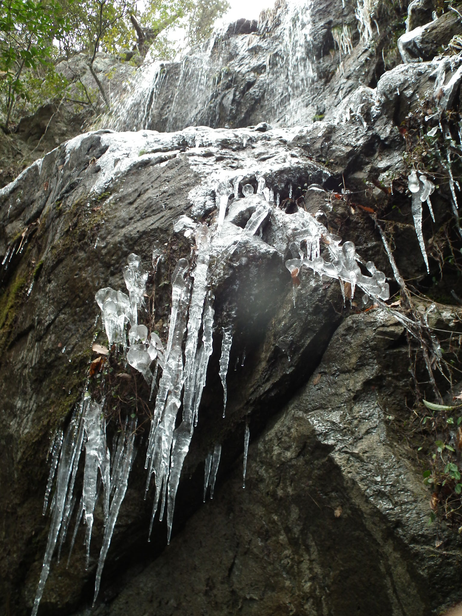 Katsuo Fudoson,Mt.Shibire 勝尾不動尊修験滝 神戸市北区淡河町 シビレ山